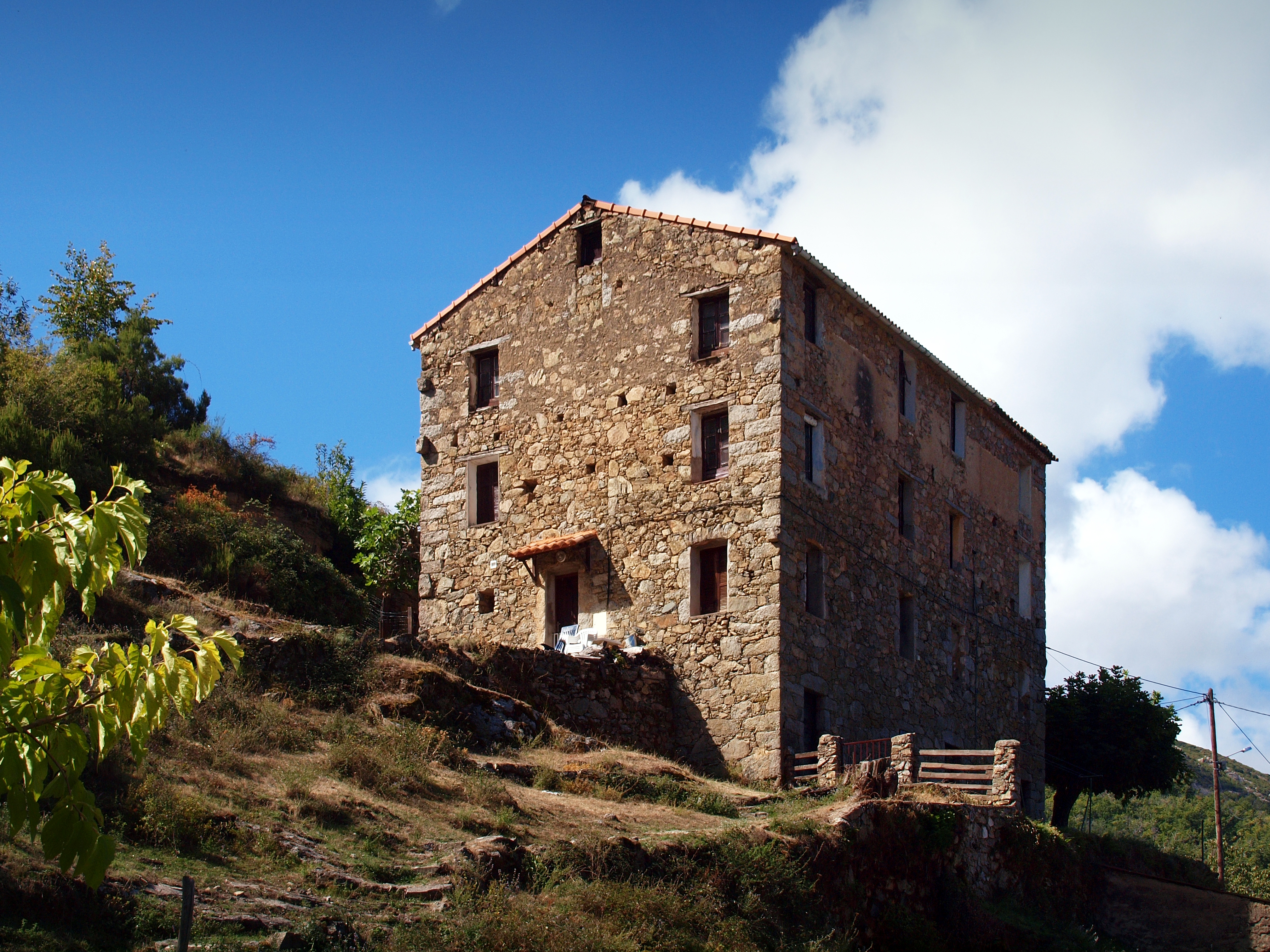 Marignana (Corse) - Maison ancienne à a Pughjola